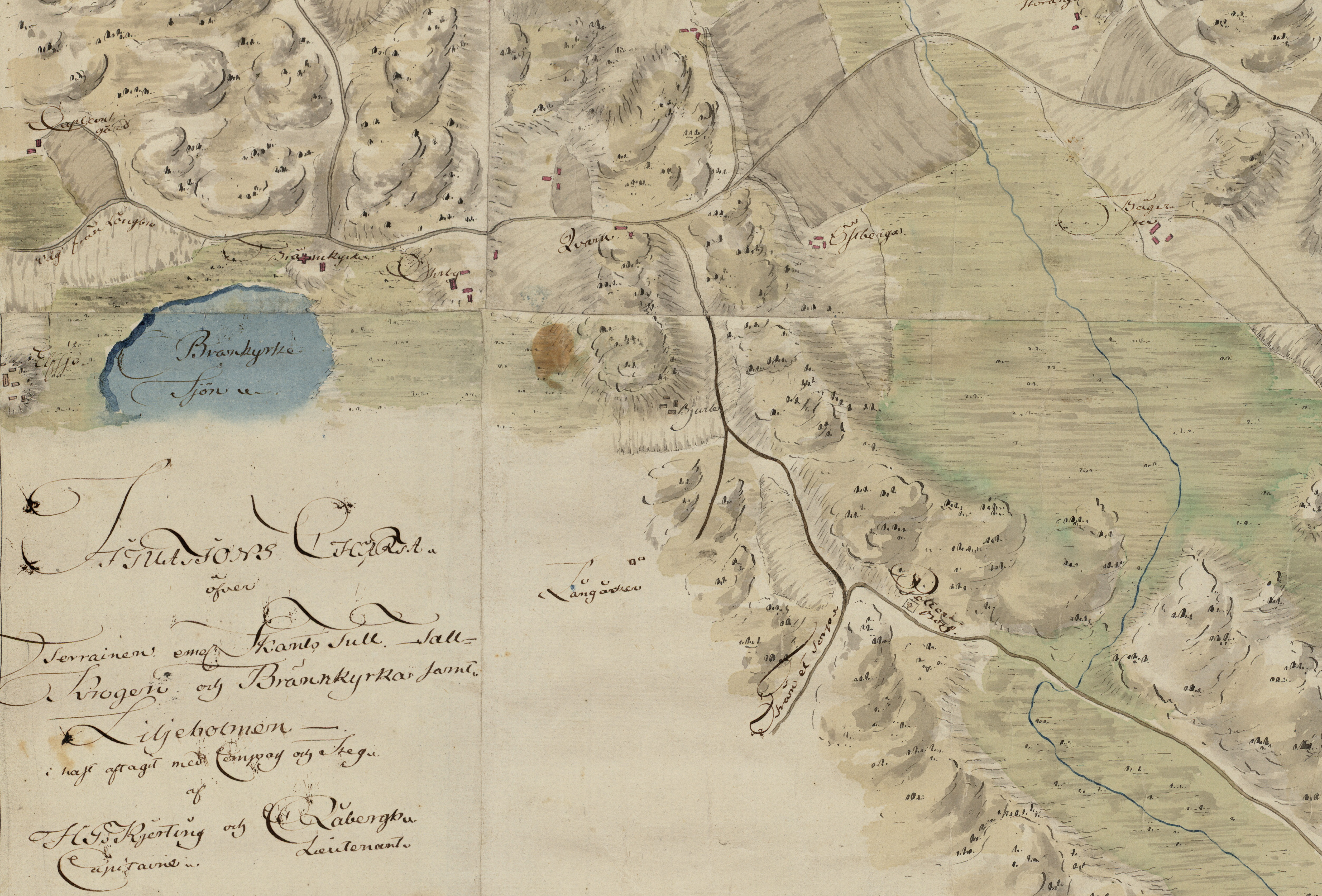 Del av karta över terrängen mellan Skanstull-Tallkrogen-Brännkyrka-Liljeholmen, 1796